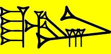 Lugal (sumerico; accadico: bēlu; šarru), segno cuneiforme per indicare il "re", il "signore". Unicode colorato di giallo.